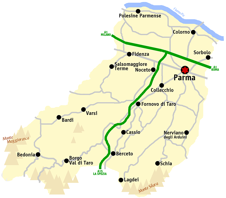 Kaart van de provincie Parma